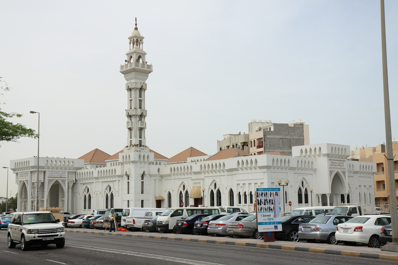 Gudaibiya mosque in Manama, Bahrain.